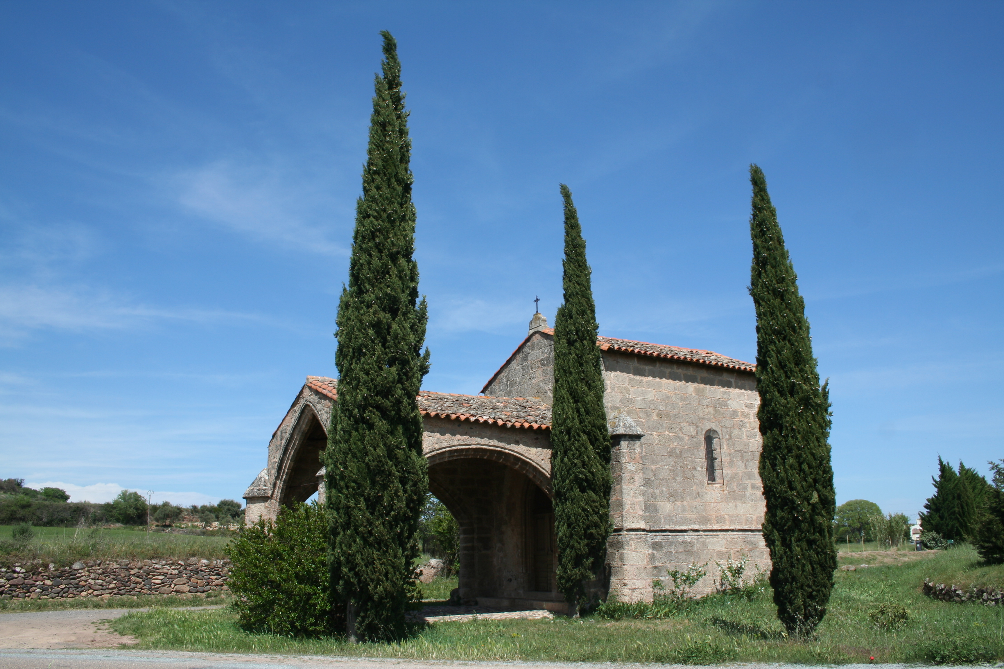 Ceyras (Hérault)- chapelle Notre-Dame de l'Hortus (XIVe - XVe siècle).